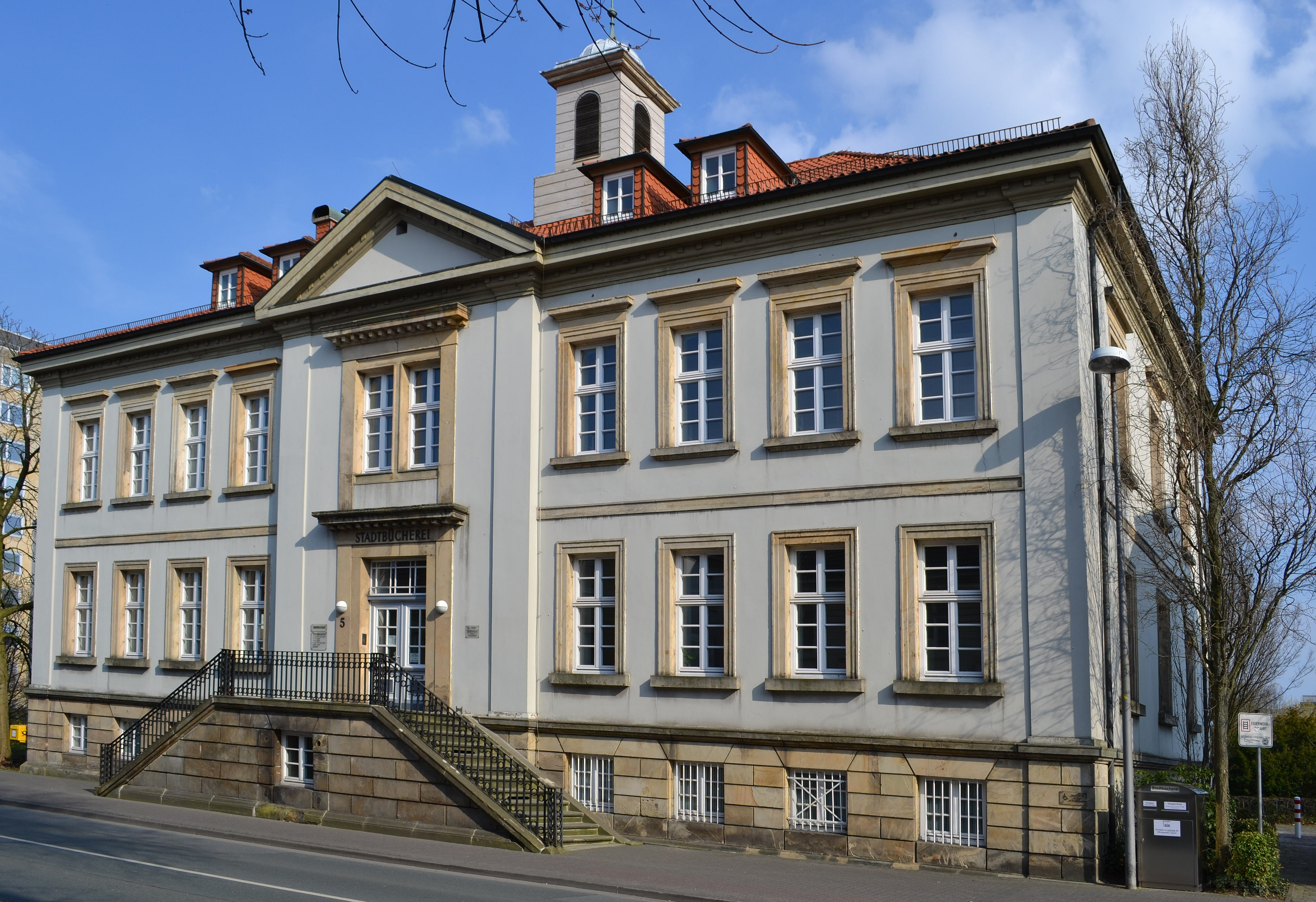 Baudenkmal Detmold Nr. 33 - Stadtbibliothek, ehemaliges Gymnasium Leopoldstraße 5